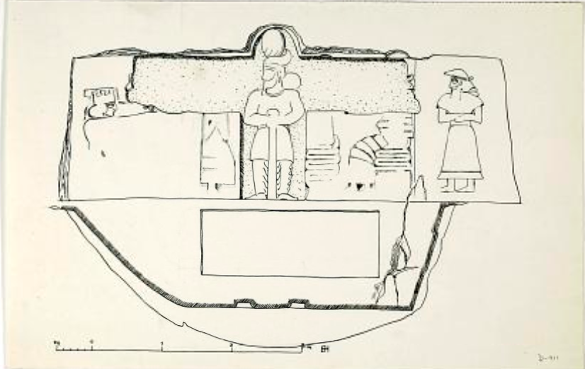 نقش عیلامی موجود در نقش رستم